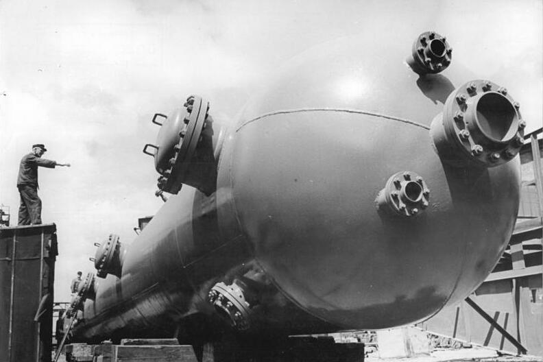 Zentralbild-Biscan Frö-Mea 2.6.1959 Ausrüstungen für die chemische Großindustrie werden exportiert Im Behälterbau des volkseigenen Schwermaschinenbaues "Georgij Dimitroff" in Magdeburg werden Rektifizierkolonnen für den Export in die Sowjetunion und nach Polen hergestellt. Es handelt sich um zylinderförmige Stahlbehälter, die in der Sowjetunion zum Trennen von Stoffgemischen benötigt werden. Die zuletzt gebaute Rektifizierkolonne gehört dem bisher größten Typ an: sie ist 35 Meter hoch, hat 2 Meter Durchmesser und wiegt 105.000 Kilogramm. UBz: Der Stahlriese wird zum Verladeplatz dirigiert.